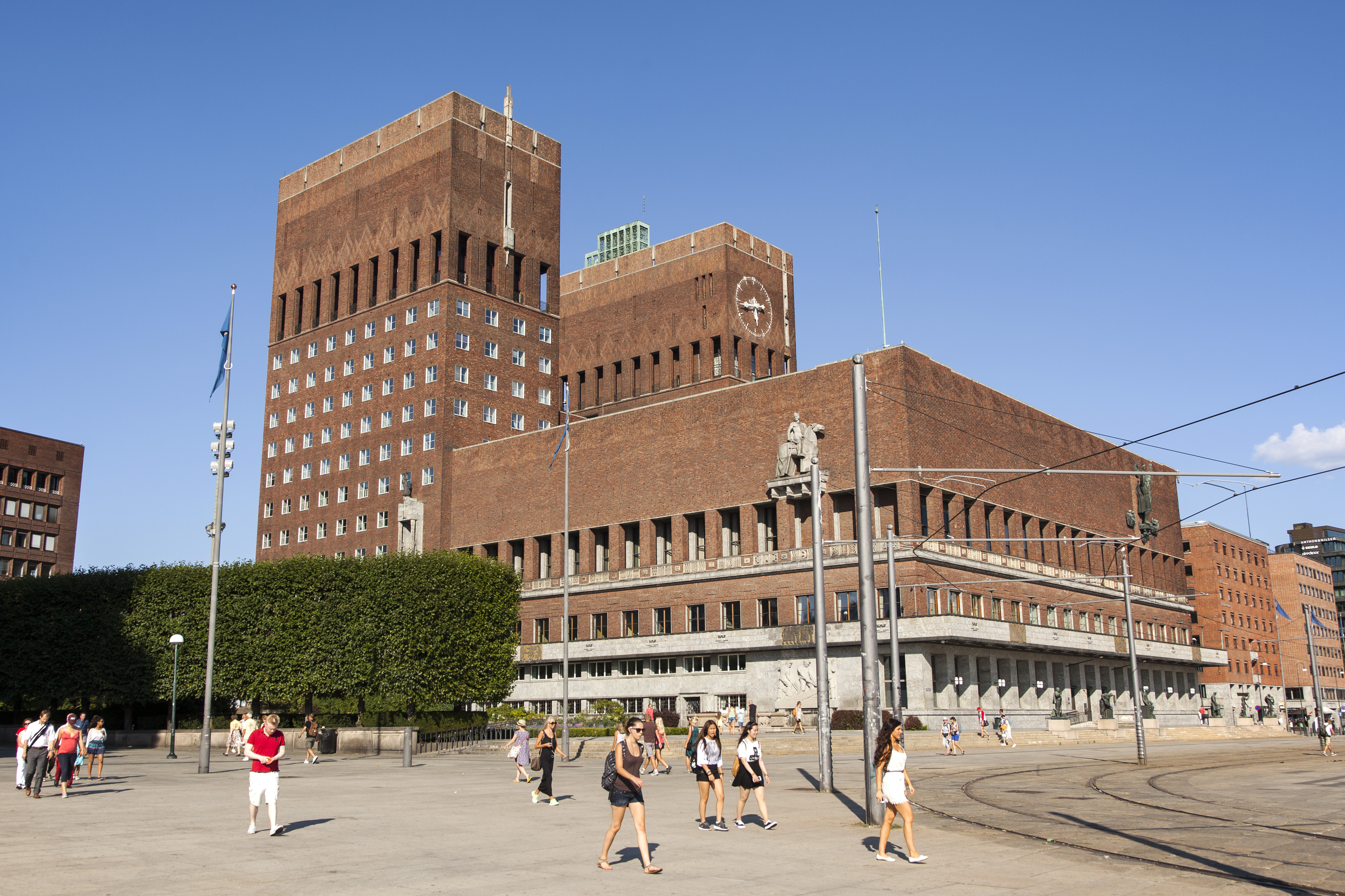 Rådhuset i Oslo